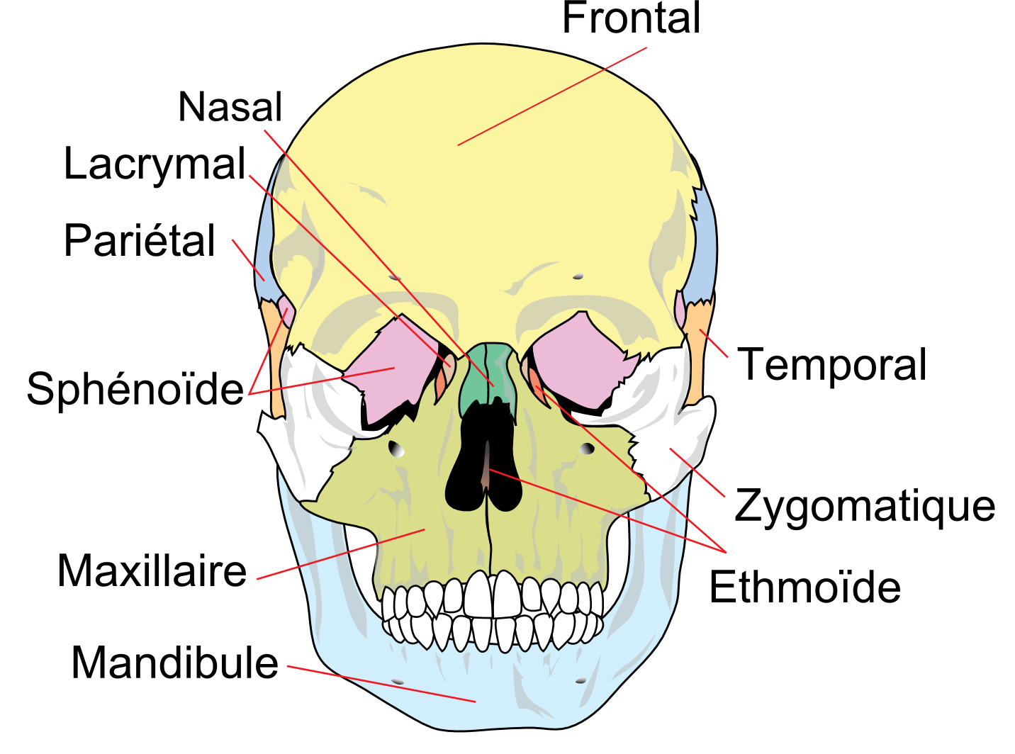 Crane_humain_de_face